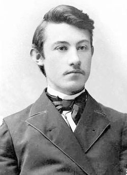 Маскаев Яков Иванович - деятель Русской православной церкви